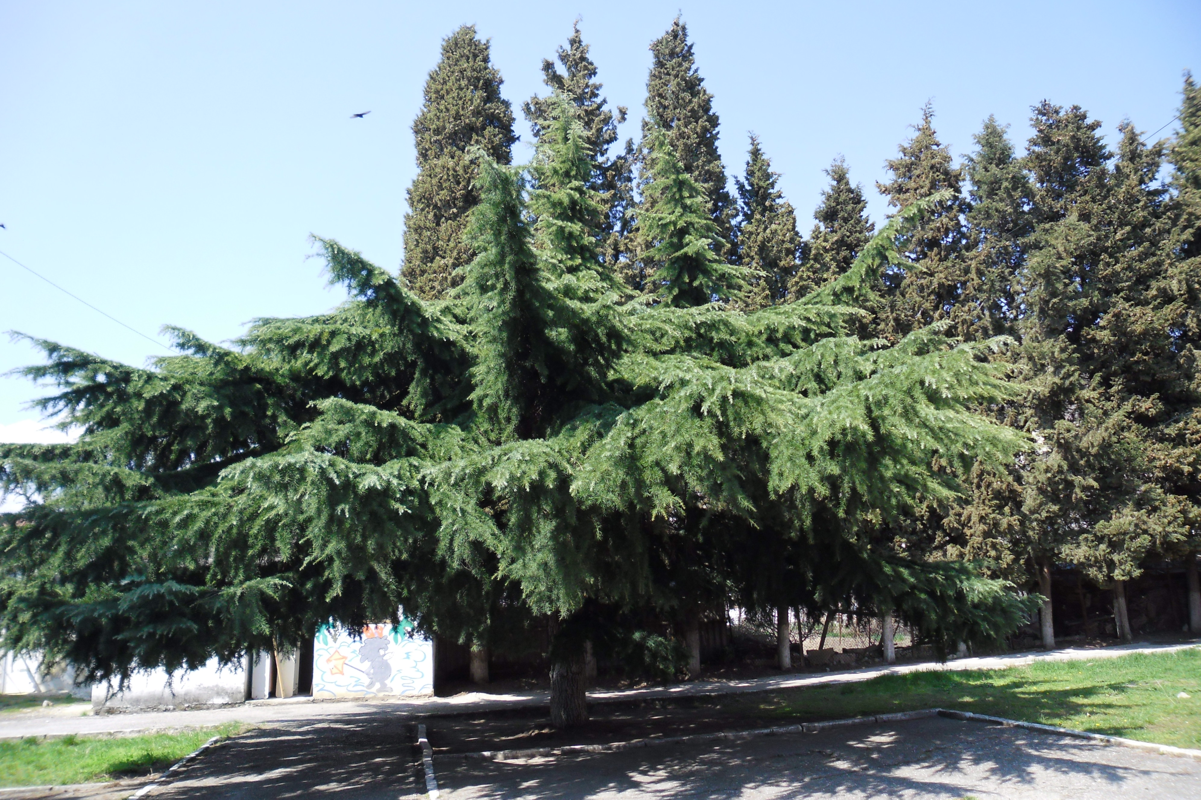 Фото